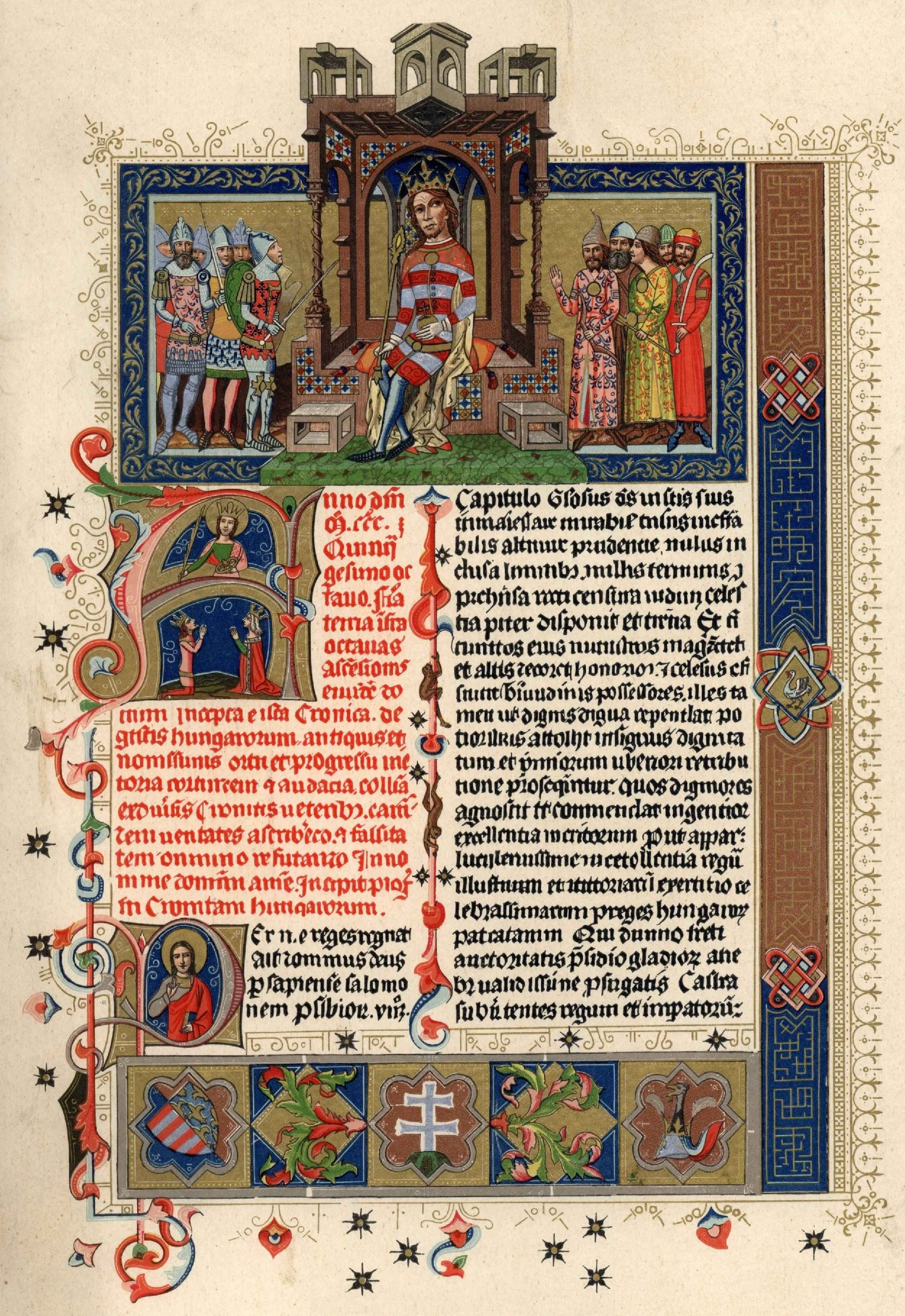 A Képes Krónika első lapja "Cronica de gestis Hungarorum", irodalomtörténeti tekintetben egyike legfontosabb krónikáinknak, mert ősi mondáinkat legteljesebb és legköltőibb alakban tartotta fenn. E fényes kiállítású kézirat 73 ívrétű hártyalevélből áll, melyek mindegyikét történeti eseményeket és alakokat feltüntető miniature képek díszítik. Ezeknek száma 142. A képek a sienai festői iskola modorára emlékeztetnek, festőjük ismeretlen, de valószinü, hogy e krónika hazánkban készült. Tartalmazza a magyarok történetét 1342-ig. A kéziratot Nagy Lajos királyunk számára "különféle régi krónikákból", állítólag egy MÁRK nevű barát szerkesztette 1358- ban, amiért MÁRK KRÓNIKÁJÁNAK is nevezik. Az eredeti kézirat a bécsi udvari könyvtár tulajdona. A bemutatott czímlap fejképének közepén Nagy Lajos király ül menyezetes trónon, teljes királyi díszben , fején liliomos korona. - Jobb oldalán a magyar főurak, balján, hosszú virágos köpenyekben a meghódolt népek képviselői állanak. Az " A" kezdőbetű felső részén Szt. Katalin alakja látható, alatta Nagy Lajos és Erzsébet térdepelnek. A gyönyörűen színezett keret alsó részét magyar és Anjou czimerek diszítik. A szöveg szép gót betűkkel van irva. A piros sorokban a krónika iratásának ideje és a mű tárgya van elmondva.